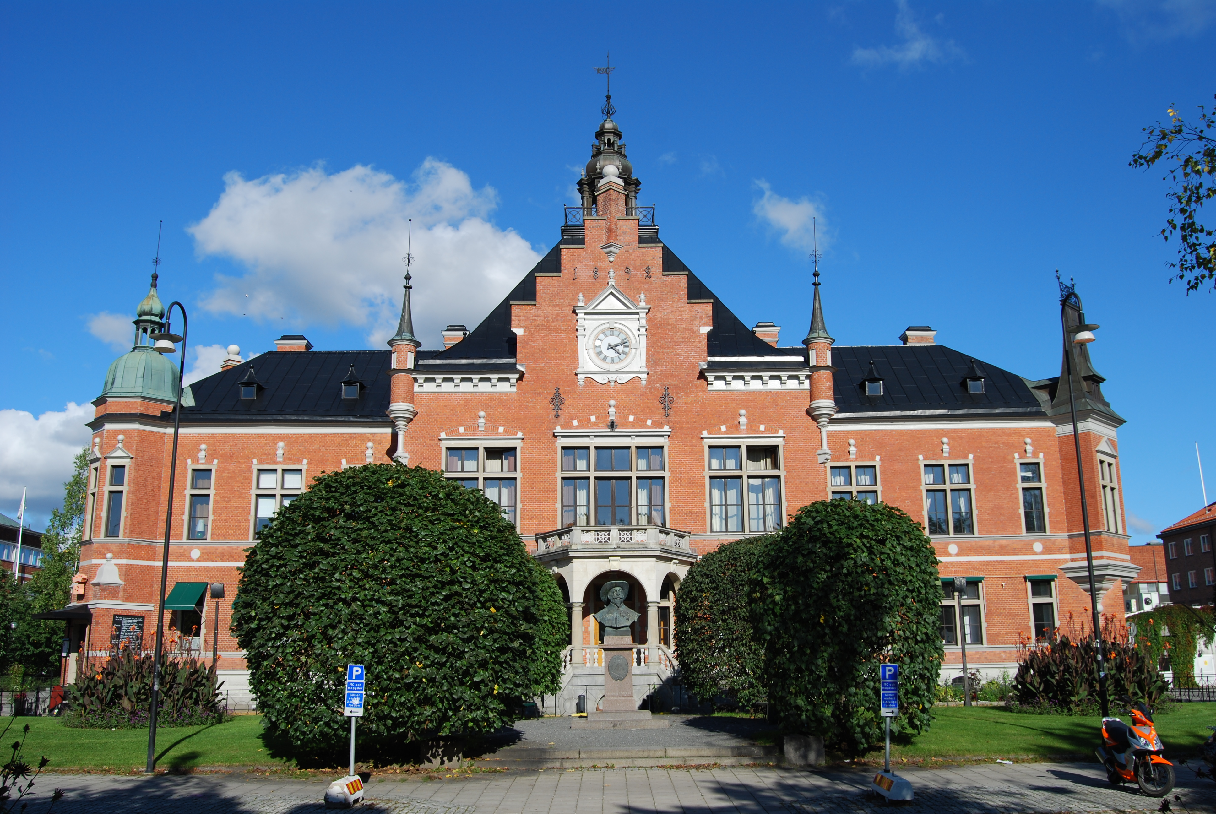 Umeå rådhus